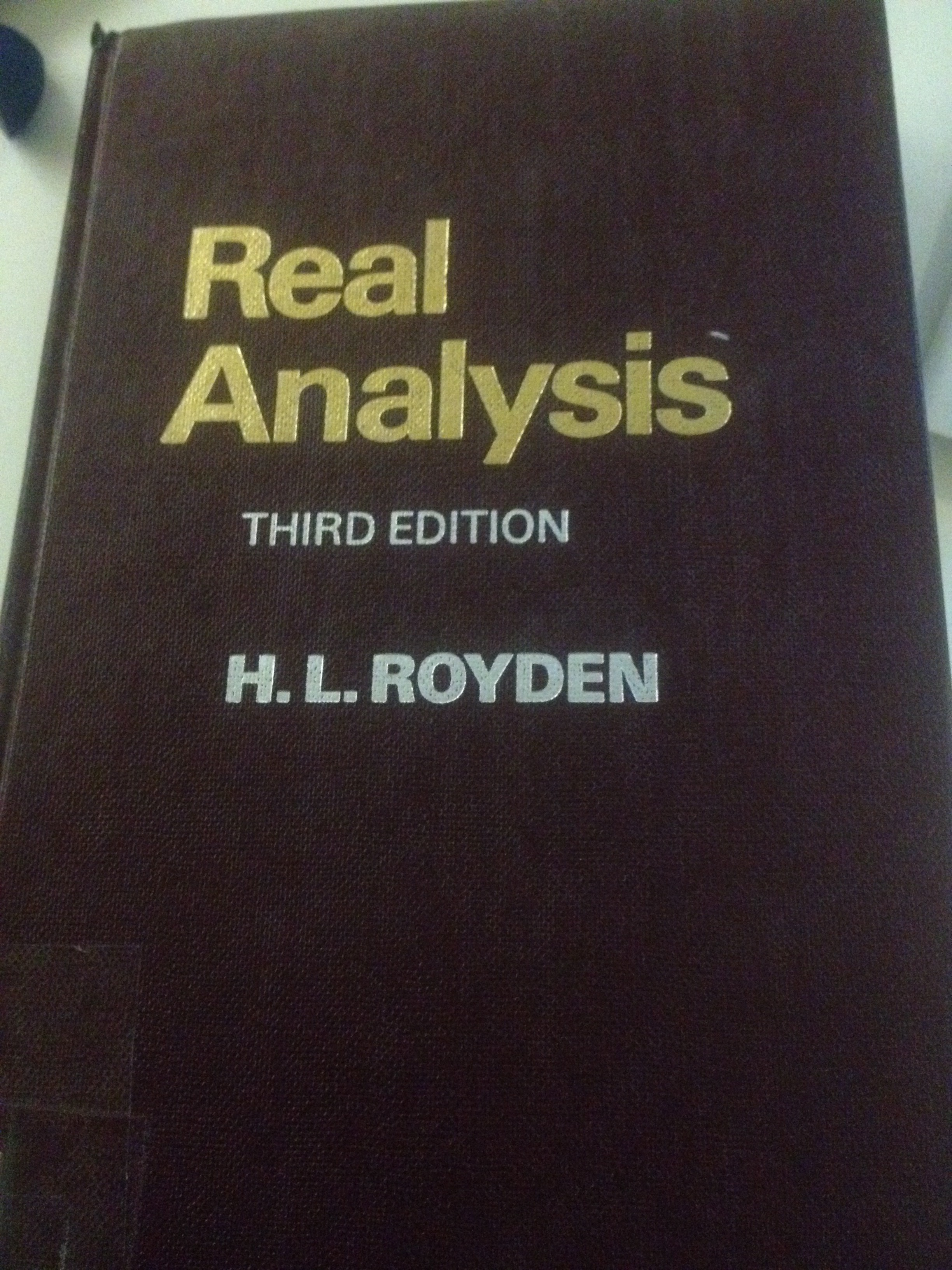 Kirja Real Analysis